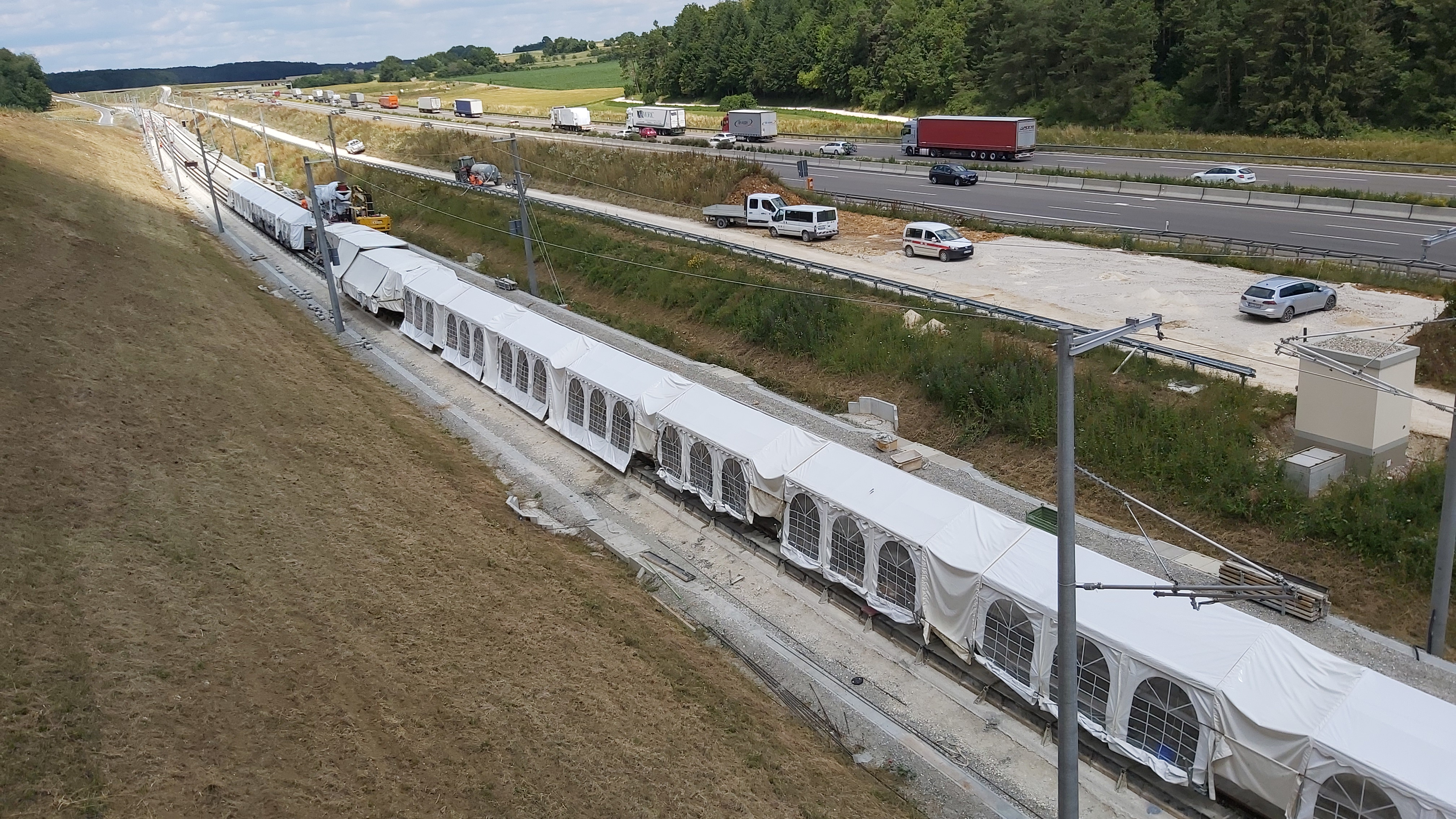 Bauarbeiten an der Festen Fahrbahn der Neubaustrecke Wendlingen–Ulm nahe Ulm.